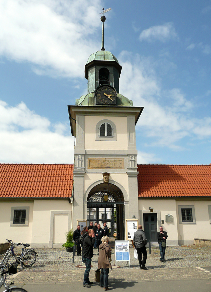 JVA Celle Torturm - über dem Toreingang eine Maske und der Spruch: „Puniendis facinorosis custodiendia furiosis et mente captis publico sumptu dicata domus“ (Zur Bestrafung der Übeltäter, zur Bewachung der Tobsüchtigen und Geisteskranken aus öffentlichen Mitteln errichtetes Haus)